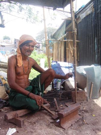 নিজ কামারশালায় একজন কামার, ঢাকা, ২০০৯৤